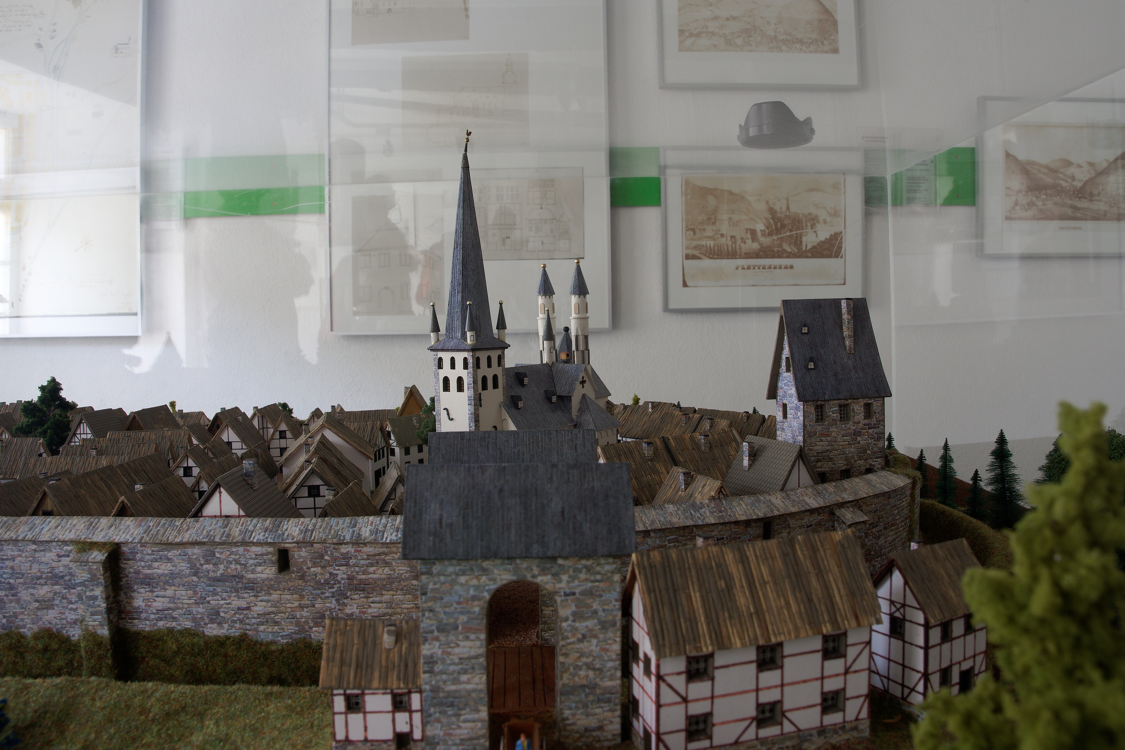 Historisches Modell der Stadt Plettenberg (im Zustand vor dem Stadtbrand 1725) im Heimathaus des Heimatvereins, Kirchplatz 8, Plettenberg. Ansicht vom Obertor auf die Christuskirche